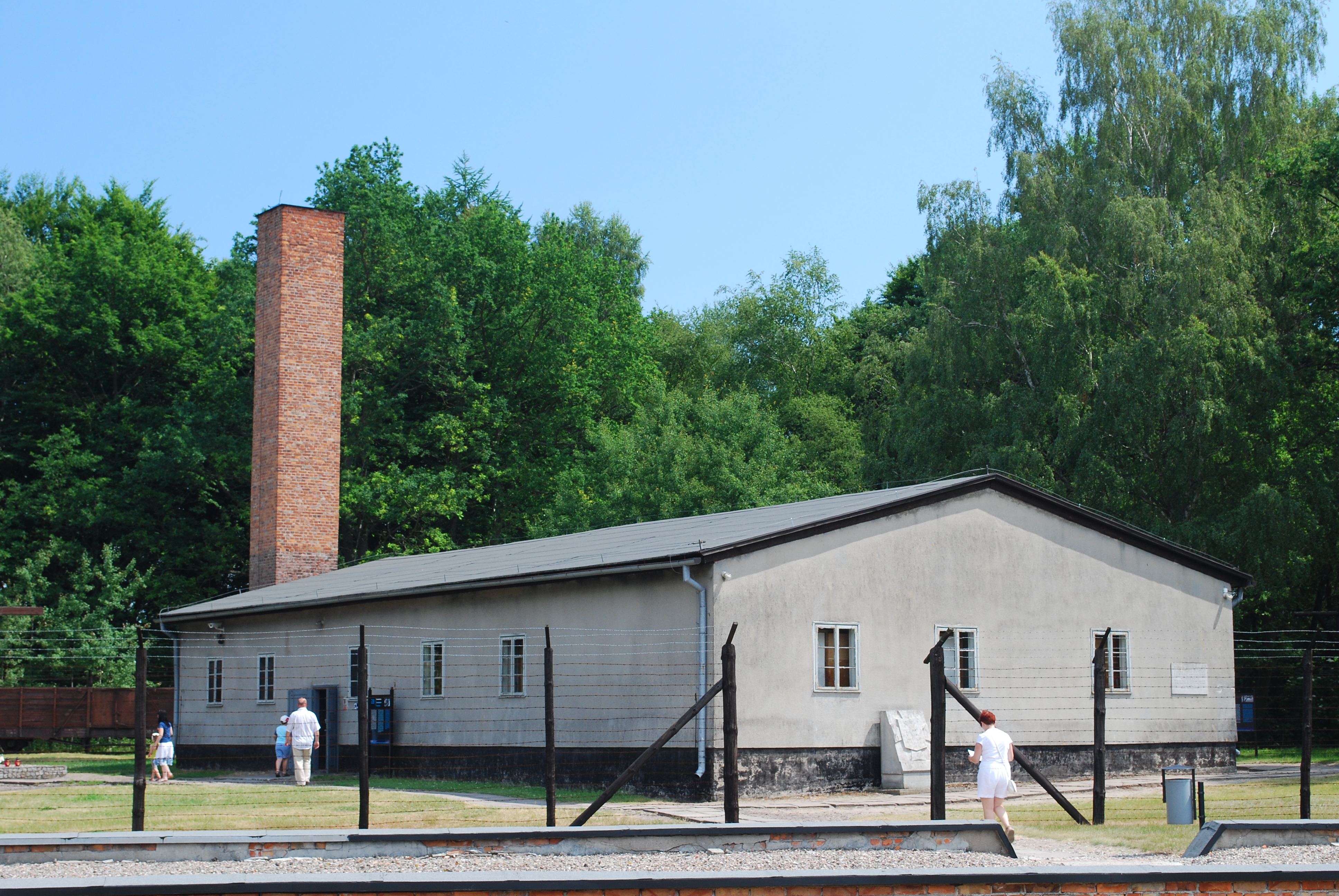 Budynek krematorium w obozie KL Stutthof.